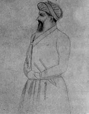 Shah Jahan